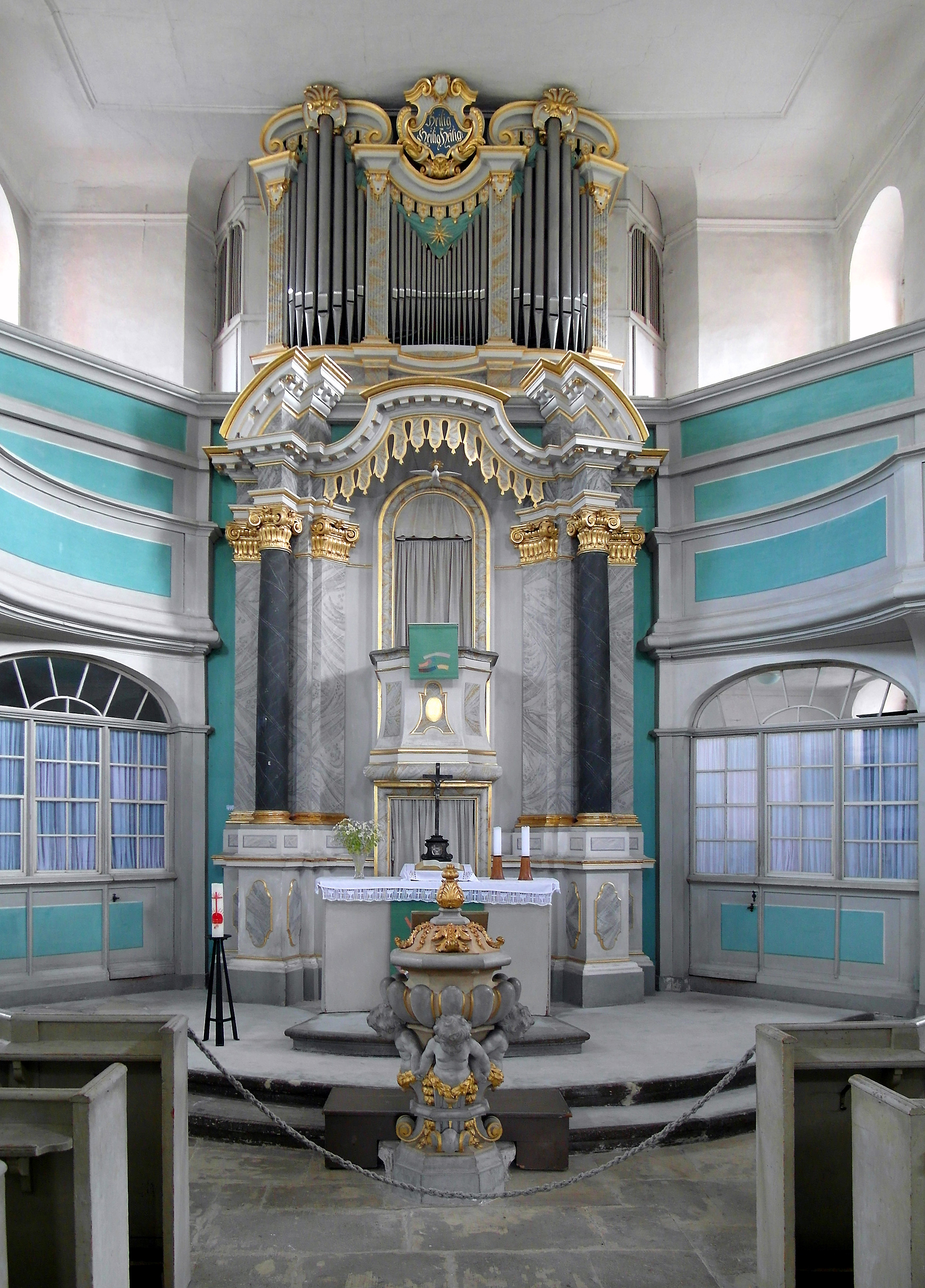 10.07.2015 01762 Schmiedeberg (Dippoldiswalde), Altenberger Str. 28 (GMP: 50.836450,13.676291): Dreifaltigkeitskirche bzw. Kirche "Zur Heiligen Dreieinigkeit". Barocker Zentralbau (1713-1716) von George Bähr. Portikuskanzelaltar. Im Orgelprospekt von 1716 ist heute eine Orgel aus dem Jahre 1967 von der Firma Rühle aus Moritzburg eingebaut. Taufstein vom Dresdener Hofbildhauer Benjamin Thomae. [SAM1048.JPG]20150710015MDR.JPG(c)Blobelt